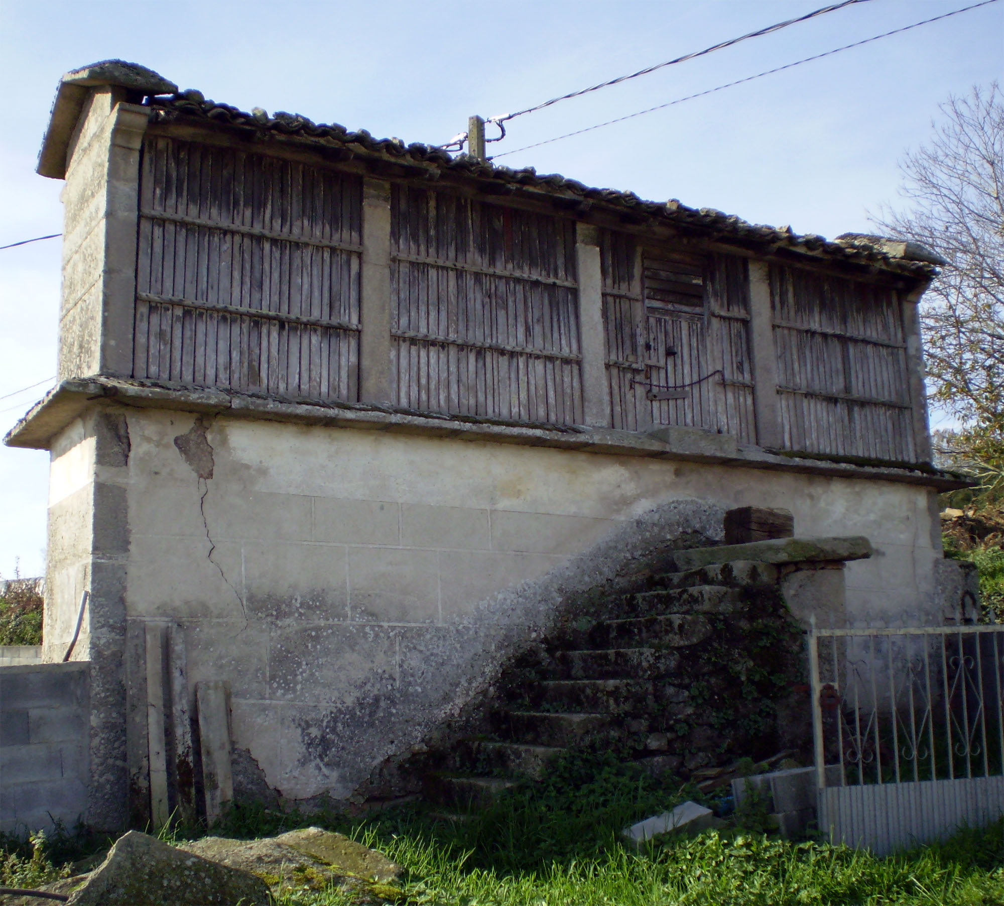 Hórreo de tipo mahía, sobre elevada soleira de mampostería. Conta con catro claros e porta lateral, con acceso mediante escaleiras. Cuberto con tella do país, non presenta adornos. Ubicado no lugar de Fondevila, na parroquia de Olveda (Antas de Ulla)